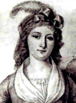 Elisabeth Fürstin zu Fürstenberg, geb. von Thurn und Taxis, 1797